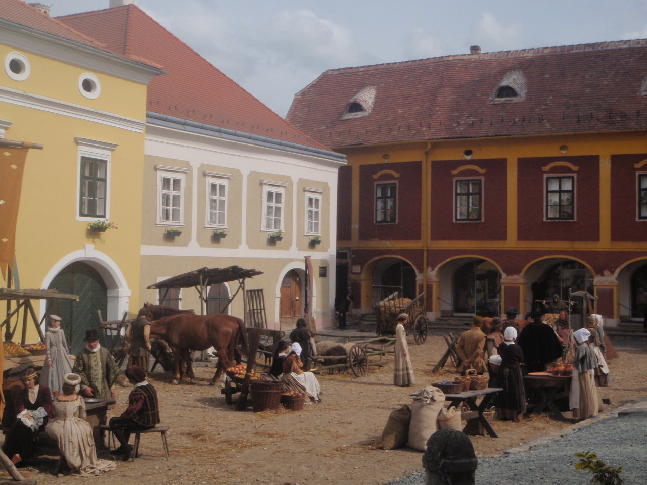 Dreharbeit in Güns